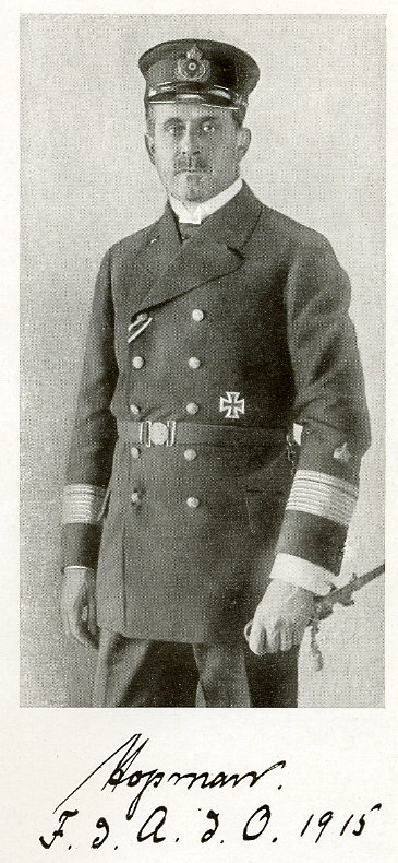 Контрадмирал (позднее - вицеадмирал) Albert Hopman